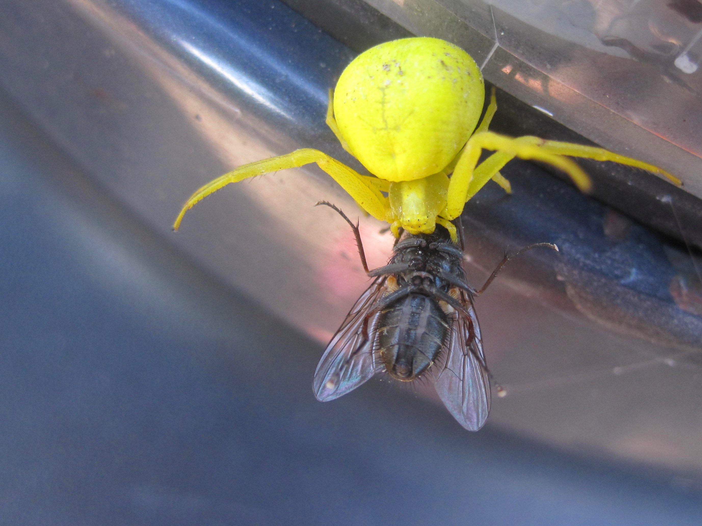 Kollane krabiämblik (Misumena)